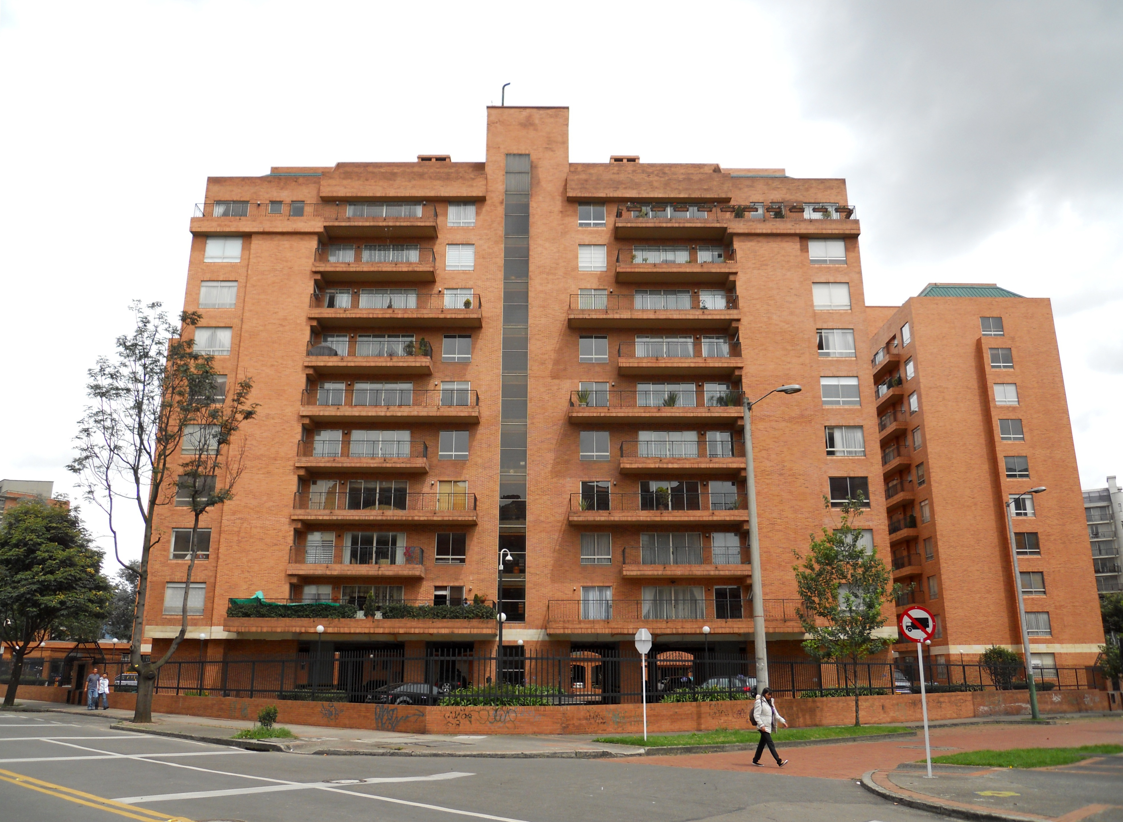 Edificio de ladrillo en Ciudad Salitre, localidad de Fontibón.